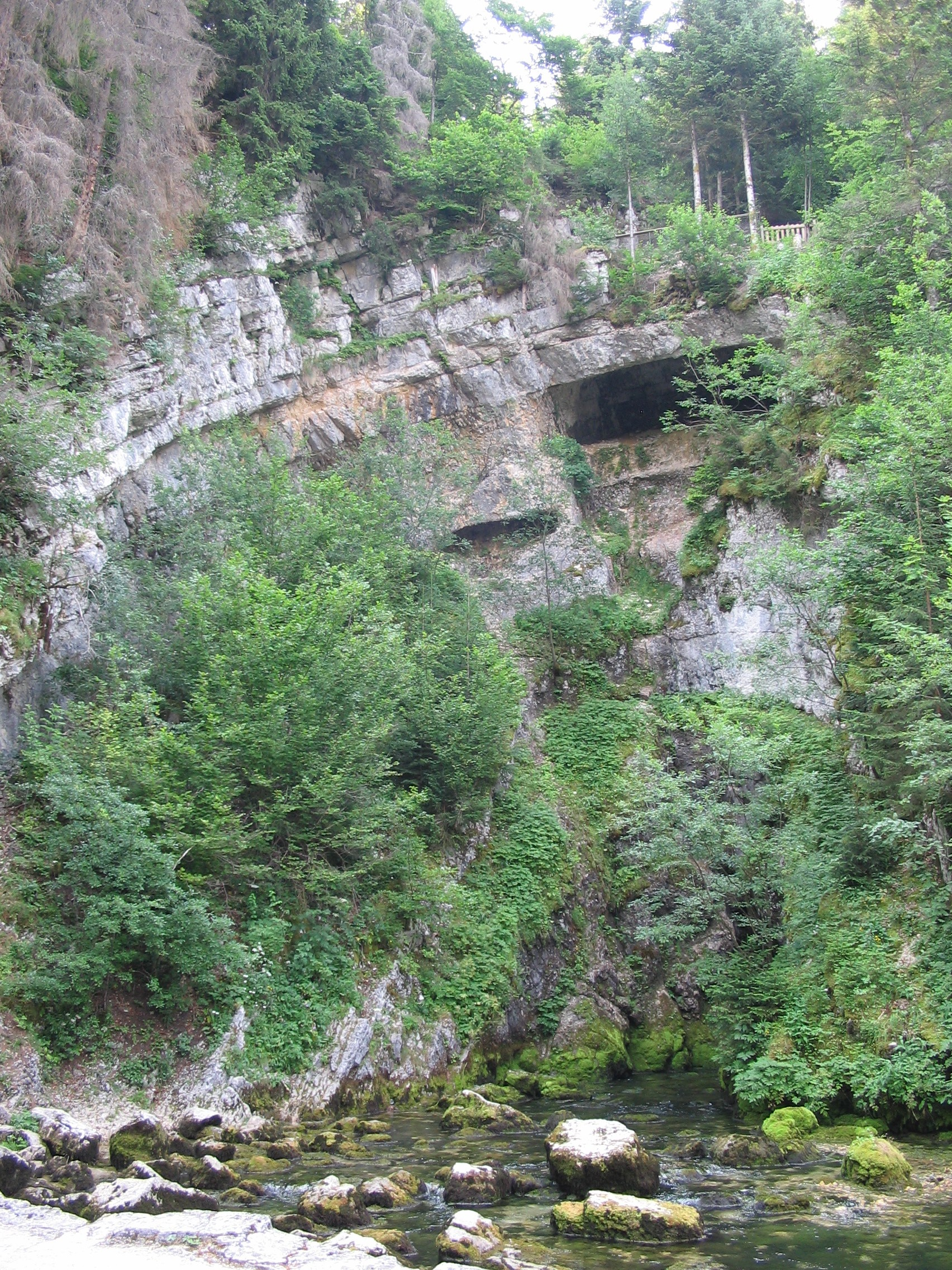 self made